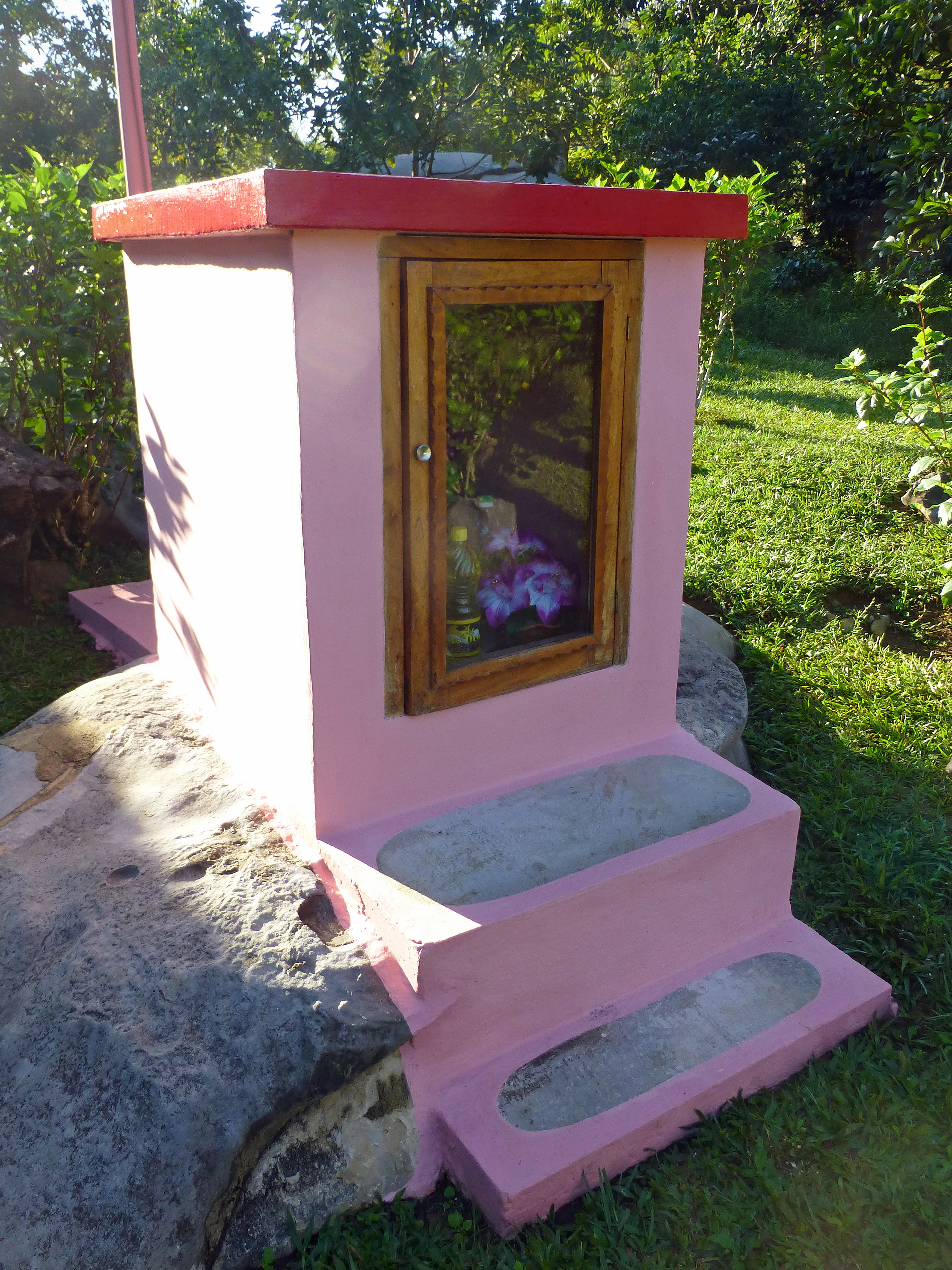 Syncrétisme religieux à Cuba : autel dédié à saint Lazare/Babalú Ayé dans la vallée de Viñales